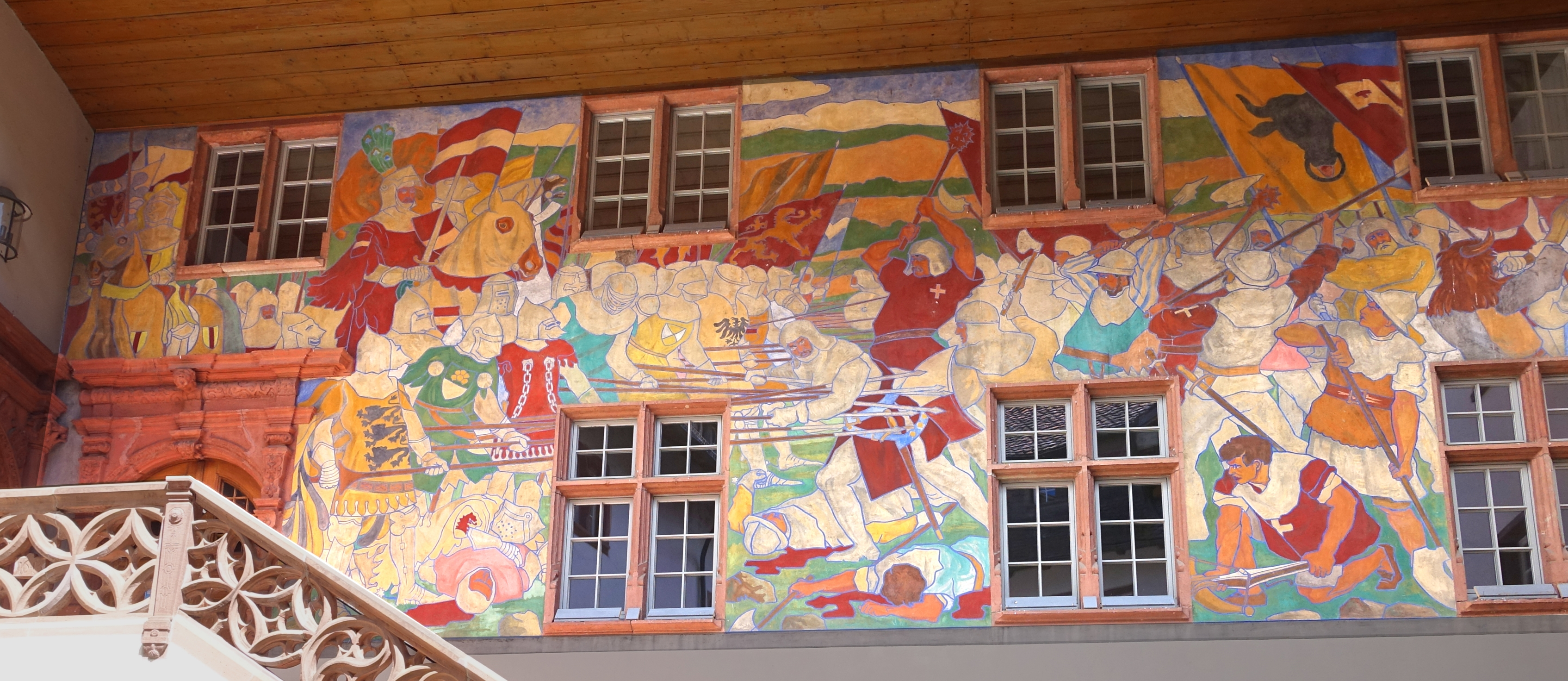 Rathaus Rheinfelden, Aargau. 1911, Wandgemälde, Arnold Winkelried, 9. Juli 1386, Schlacht von Sempach von Paul Altherr (1870–1928) Maler, Zeichner. Das Wandbild wurde von dem Salmen-Brauereibesitzer Karl Habich-Dietschy (1845–1928) gespendet.